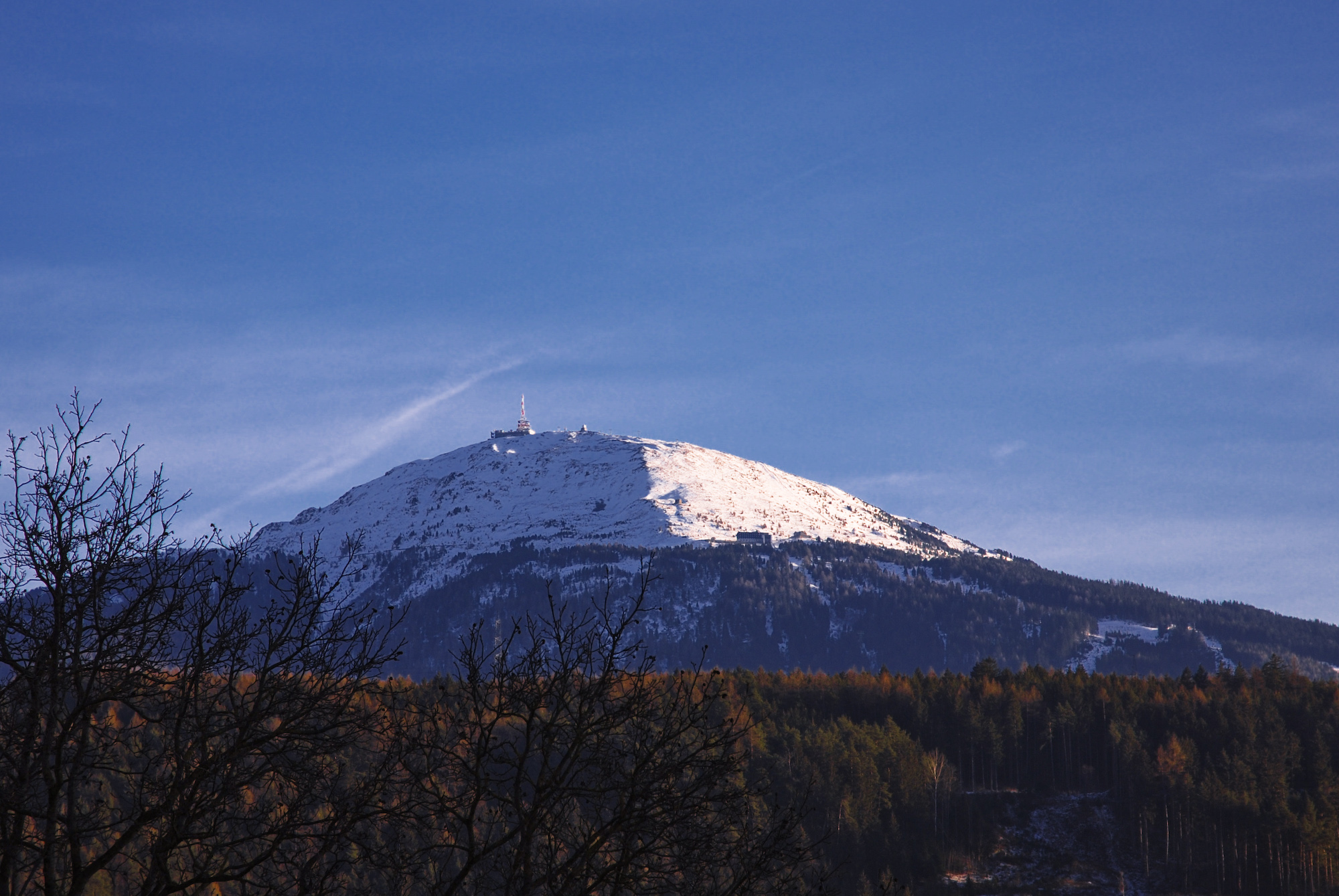 Patscherkofel, Innsbruck, Tirol, Austria Mountain Photographed 2006-12-27 by myself Veitmueller 12:17, 28 December 2006 (UTC)